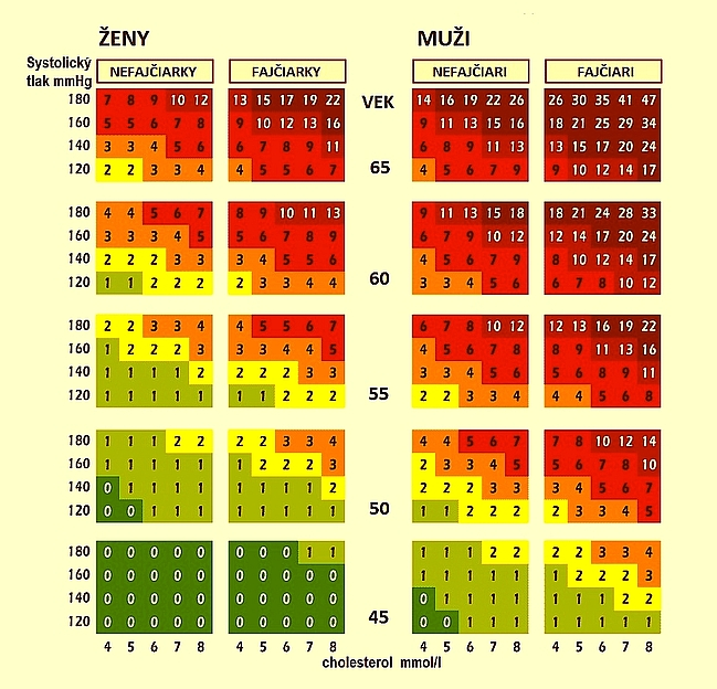 SCORE pre rizikovú populáciu - aj SK